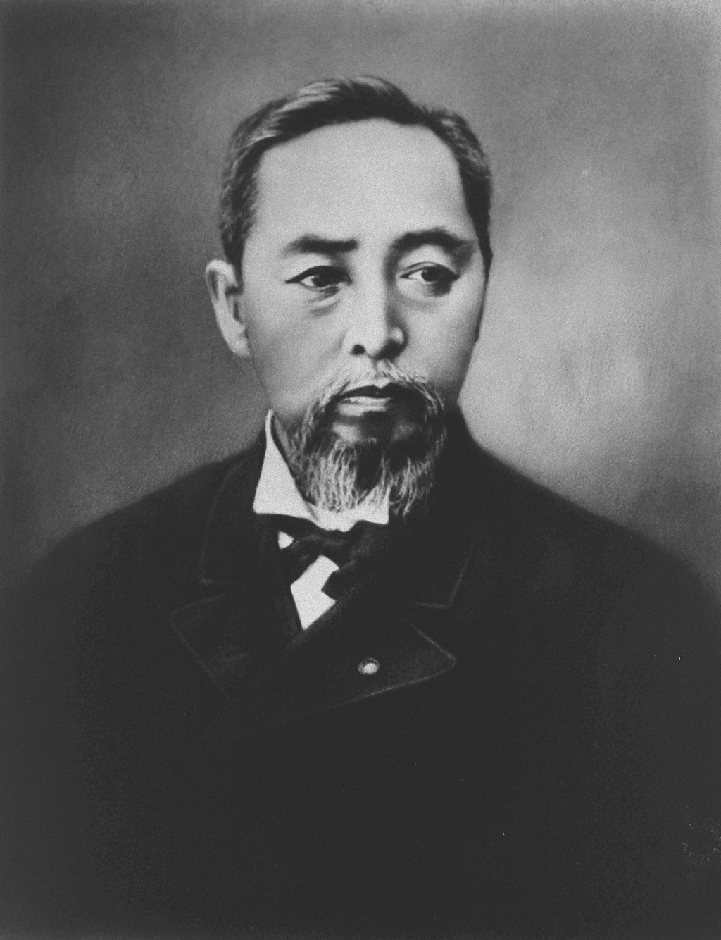 Portrait of Yamada Akiyoshi (山田顕義, 1844 – 1892)